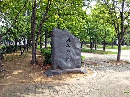 서촌공원. 경기도 부천시 원미구 상동